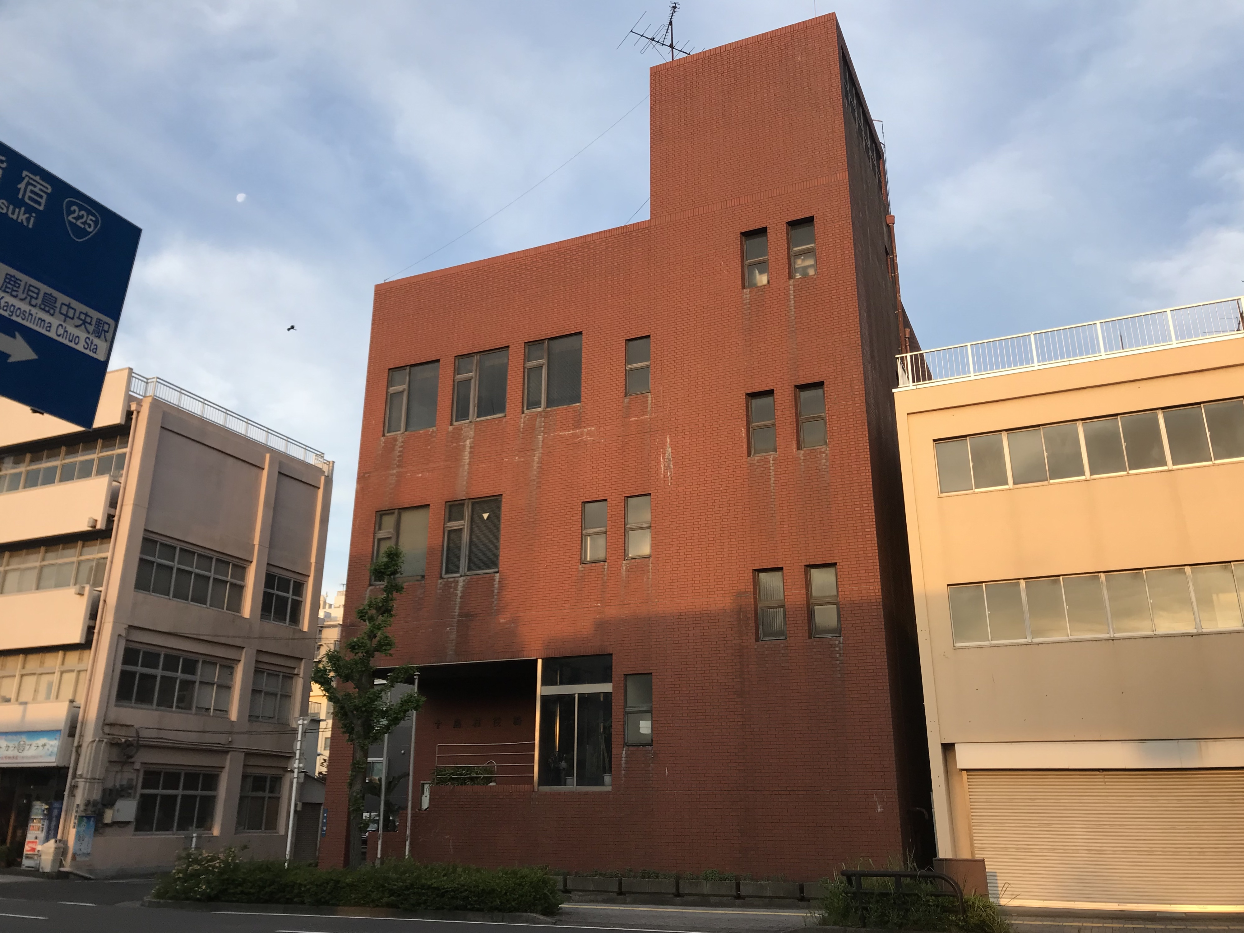 十島村役場